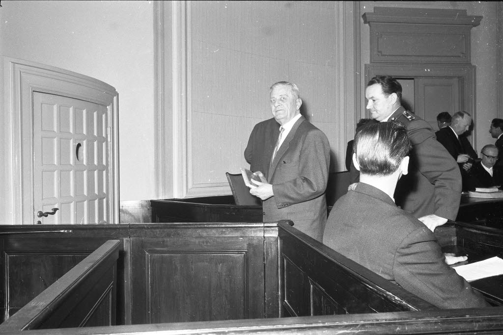 im Kieler Schwurgericht. Ehem. Waffen-SS-General und ehem. Höherer SS- und Polizeiführer Russland-Mitte Erich von dem Bach-Zelewski (Bildmitte) als Zeuge. Im Bild rechts der ehem. SS-Obersturmführer Hans Graalfs auf der Anklagebank.